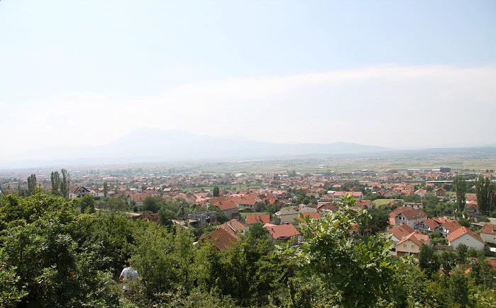 Fshati Lubizhde - Prizren